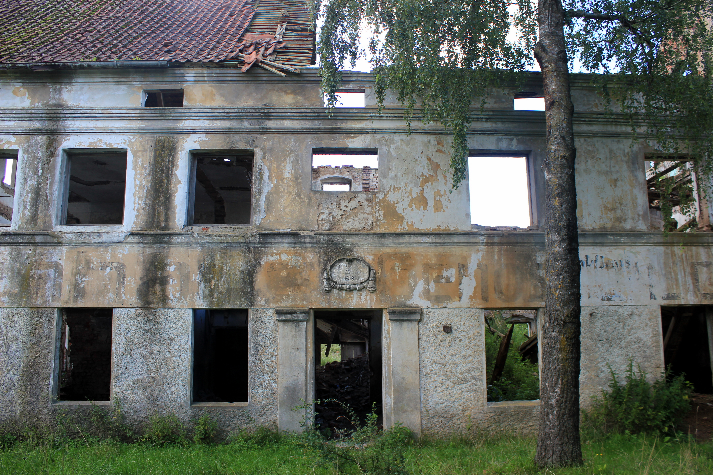 Ruine in Uslowoje (früher Rautenberg), Oblast Kaliningrad, Russland.